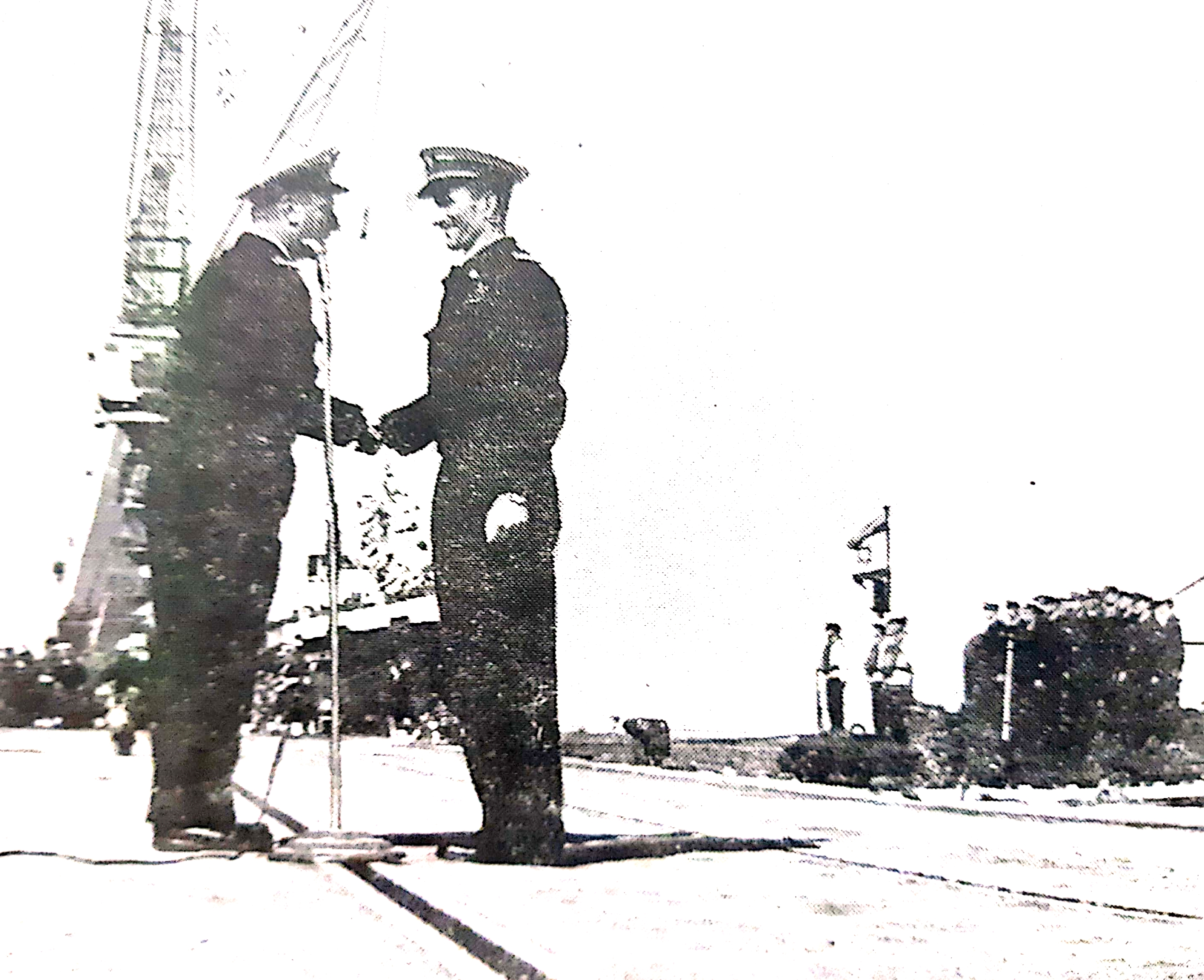 מפקד חיל הים אלוף שמואל טנקוס מעניק את סמל הצוללן מס 1 לסא"ל יוסף דרור בטקס קבלת הפנים לאח"י תנין 16 בדצמבר 1958.